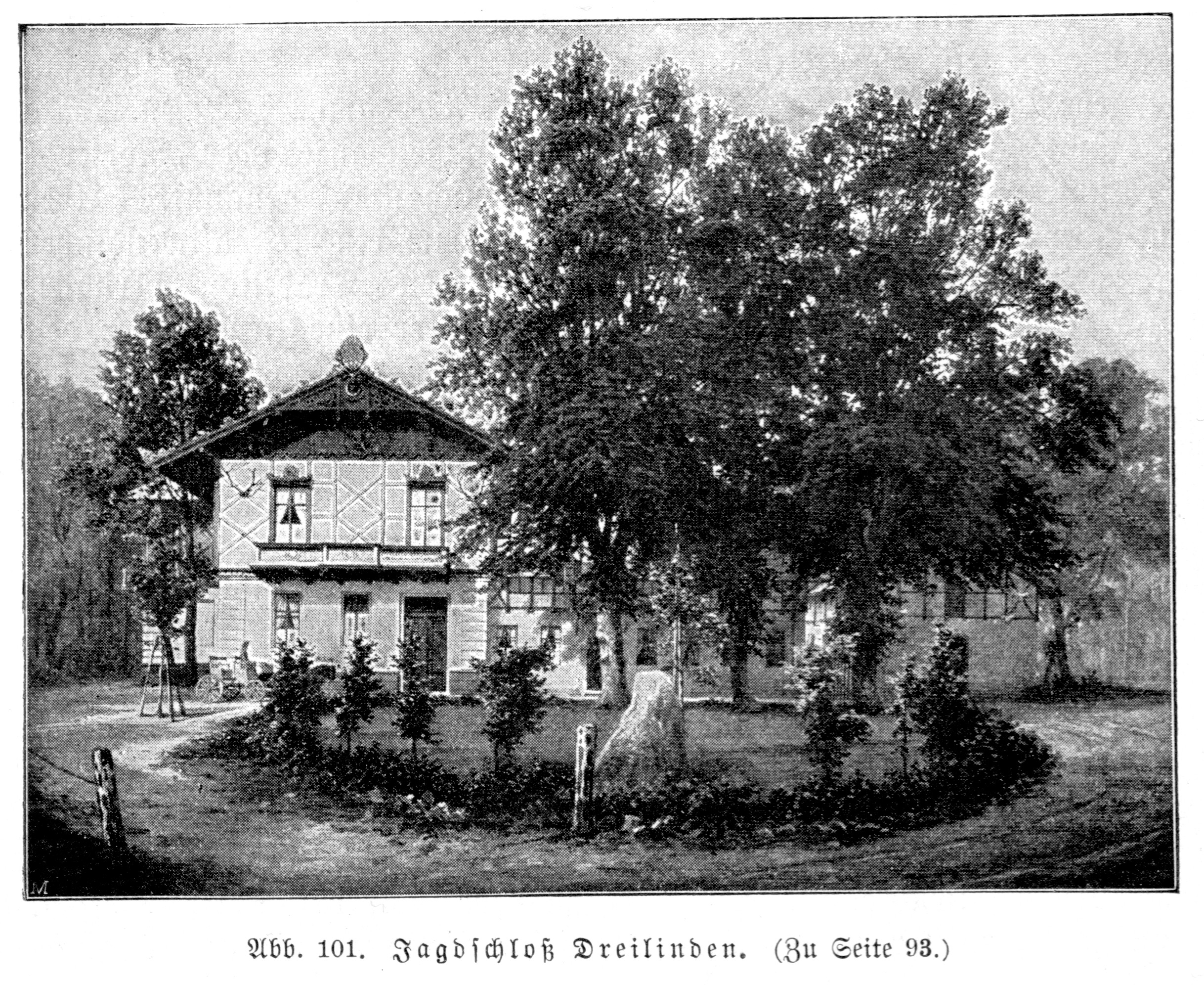 Jagdschloss Dreilinden, near Berlin, Germany, demolished in 1945